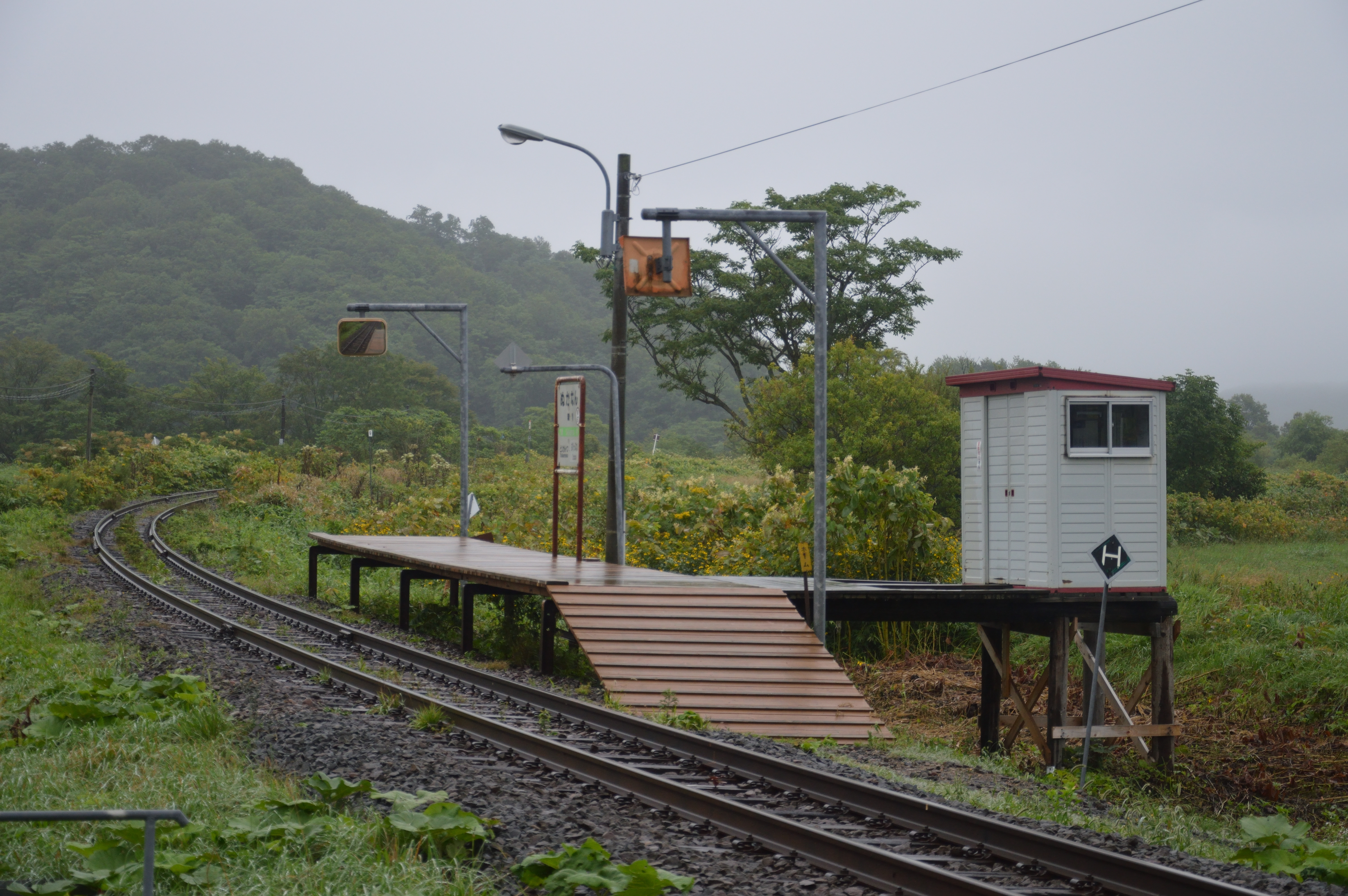 JR北海道宗谷本線糠南駅 Nikon D3200